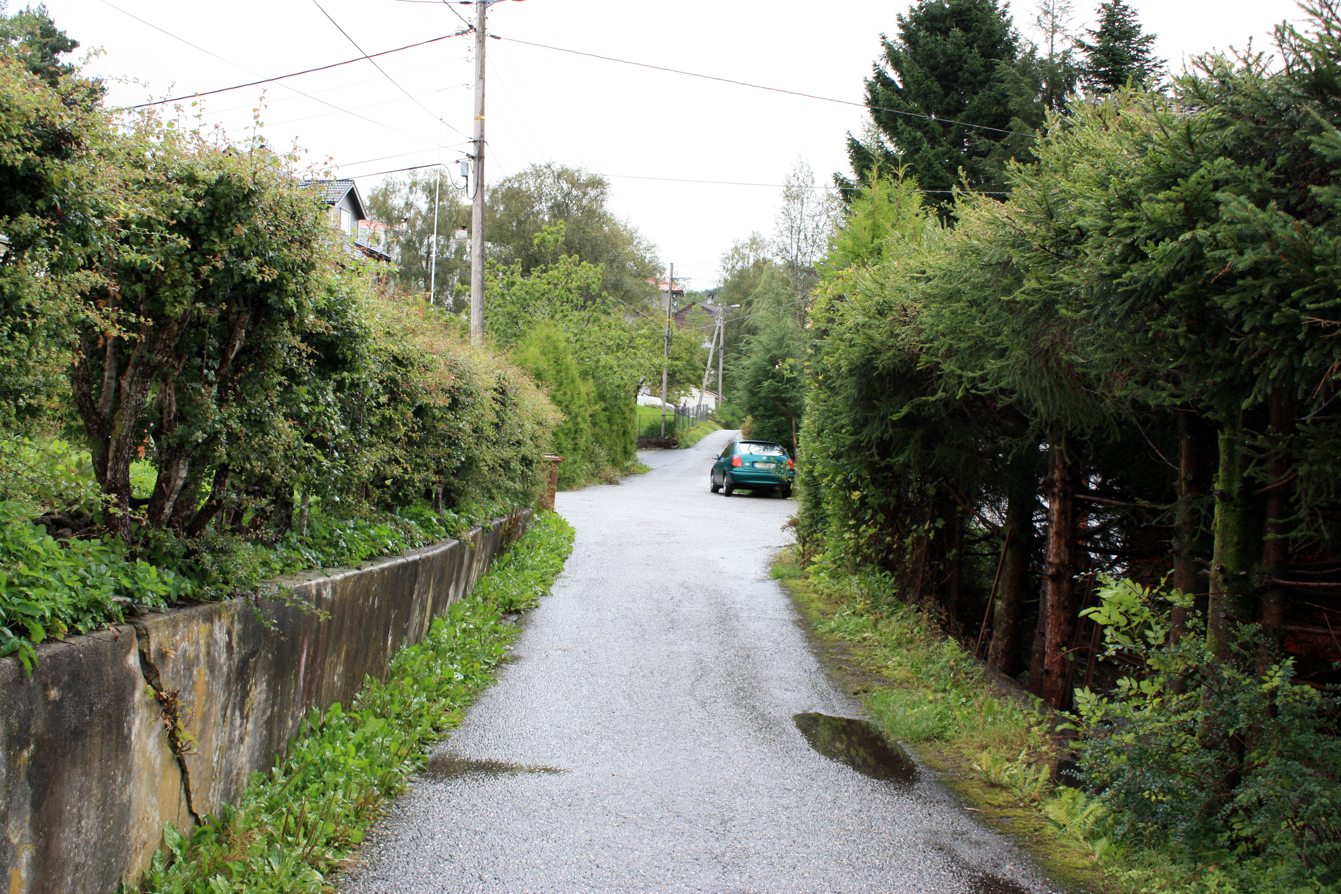 Otervegen, Fana, Bergen.